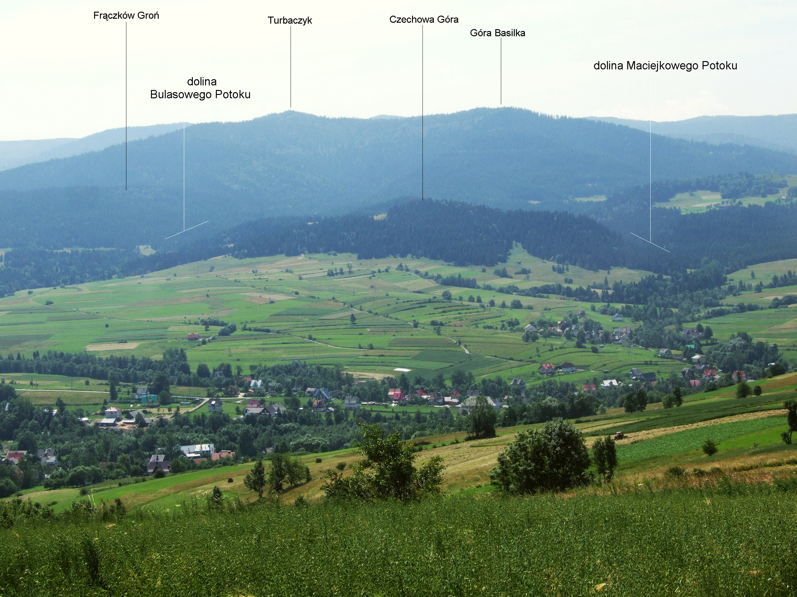 Widok ze Spyrkowej